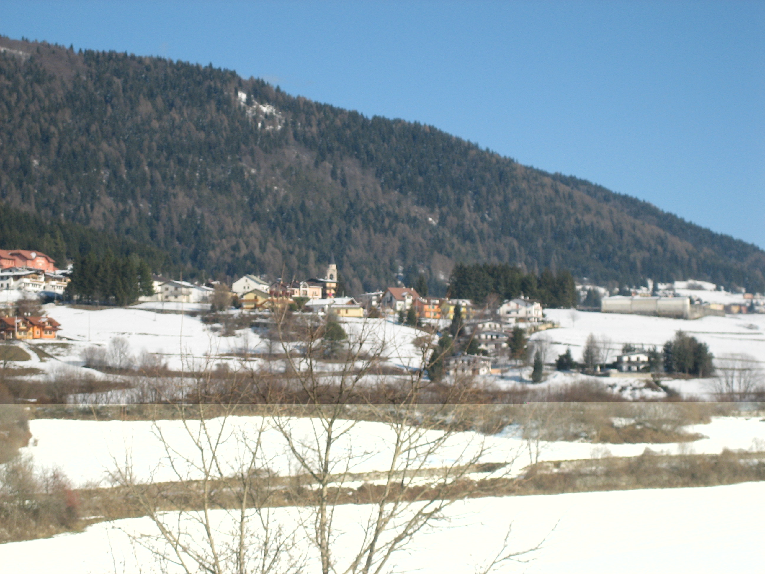 Rotzo e la sua campagna.